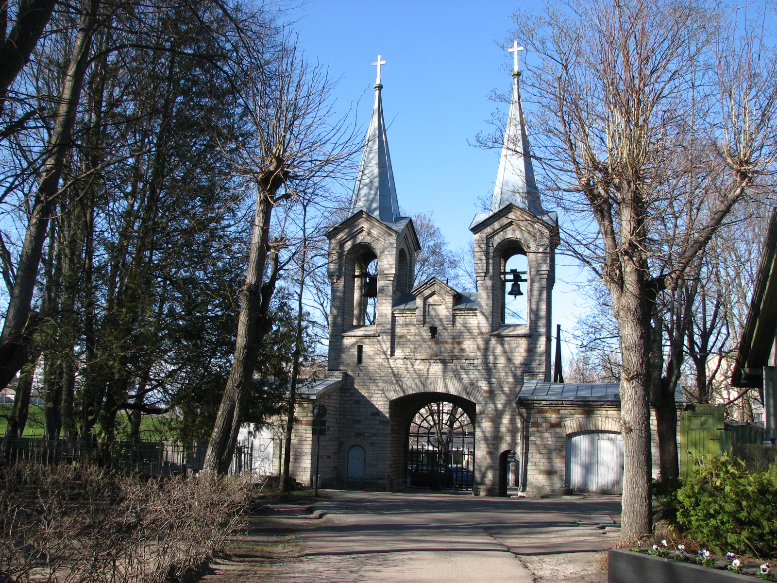 Vana-Kaarli kalmistu väravaehitis-kabel 1893. aastast. Kesklinna linnaosa, Siselinna kalmistu, Toonela tee 3